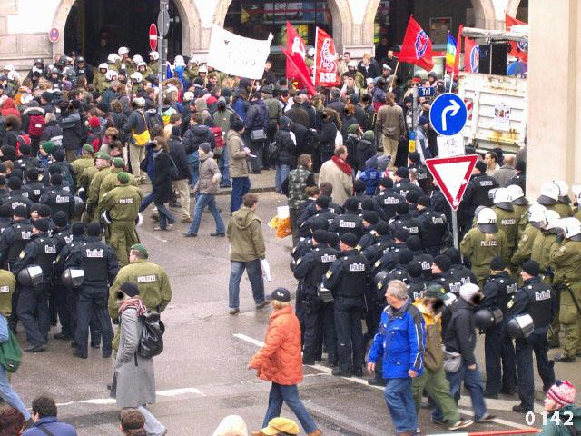 USK